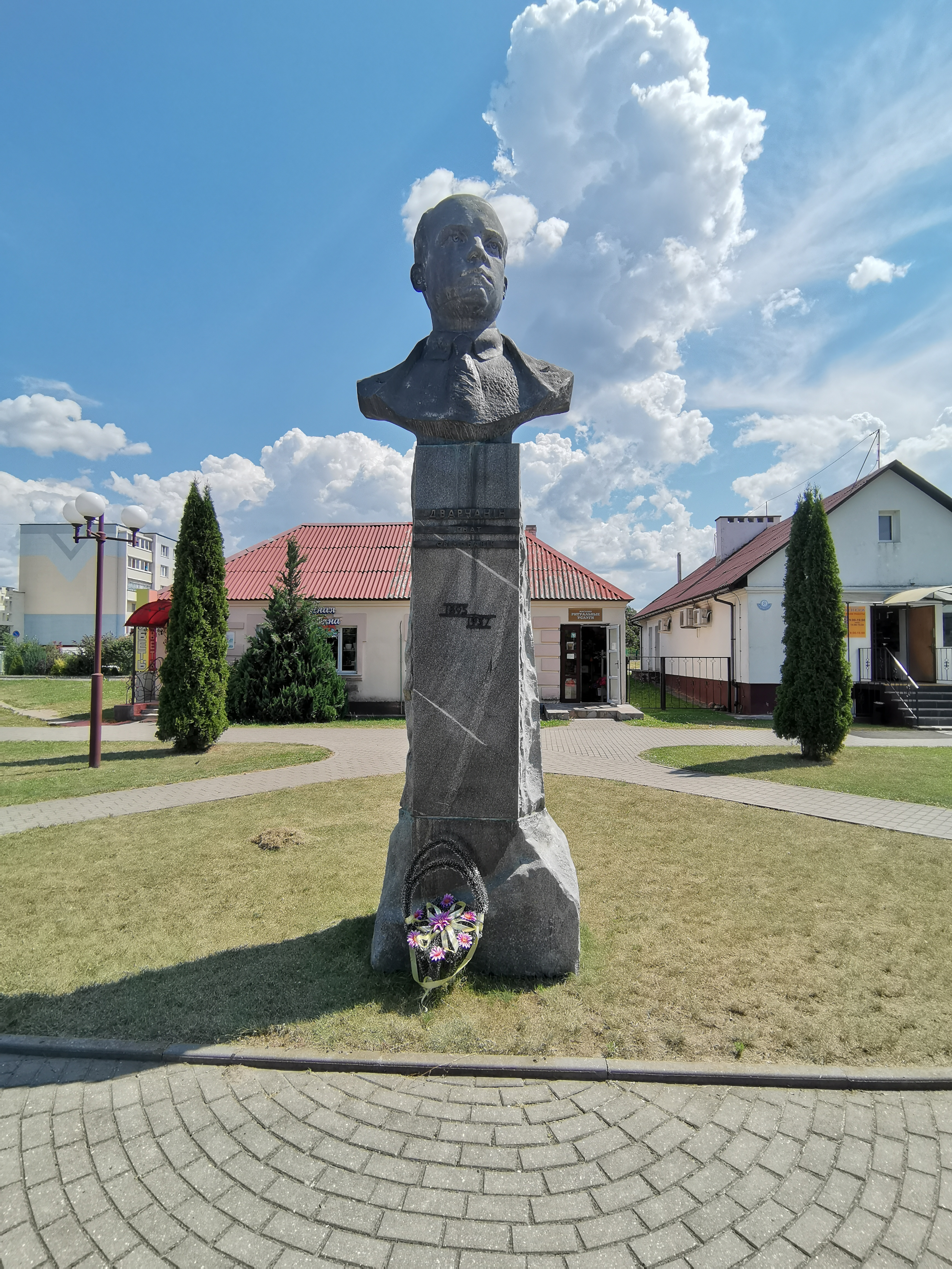 Памятник Игнату Дворчанину в городе Дятлово